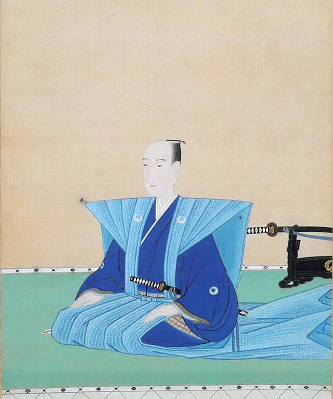 諫早茂孫の肖像。